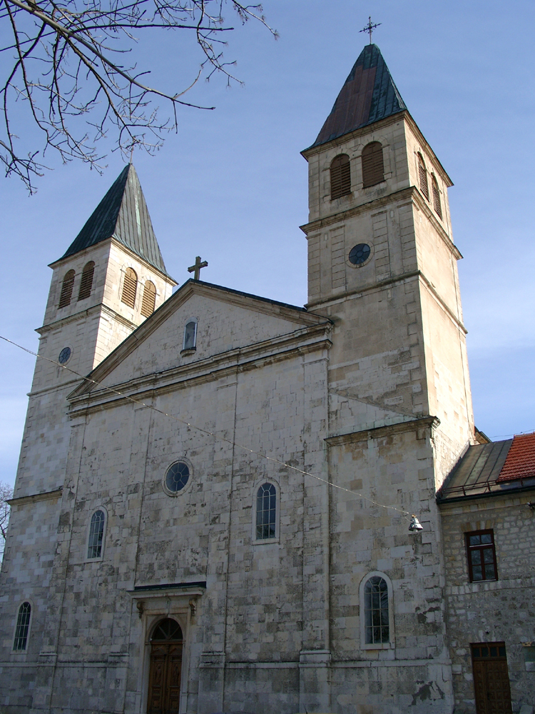 Gorica Livno